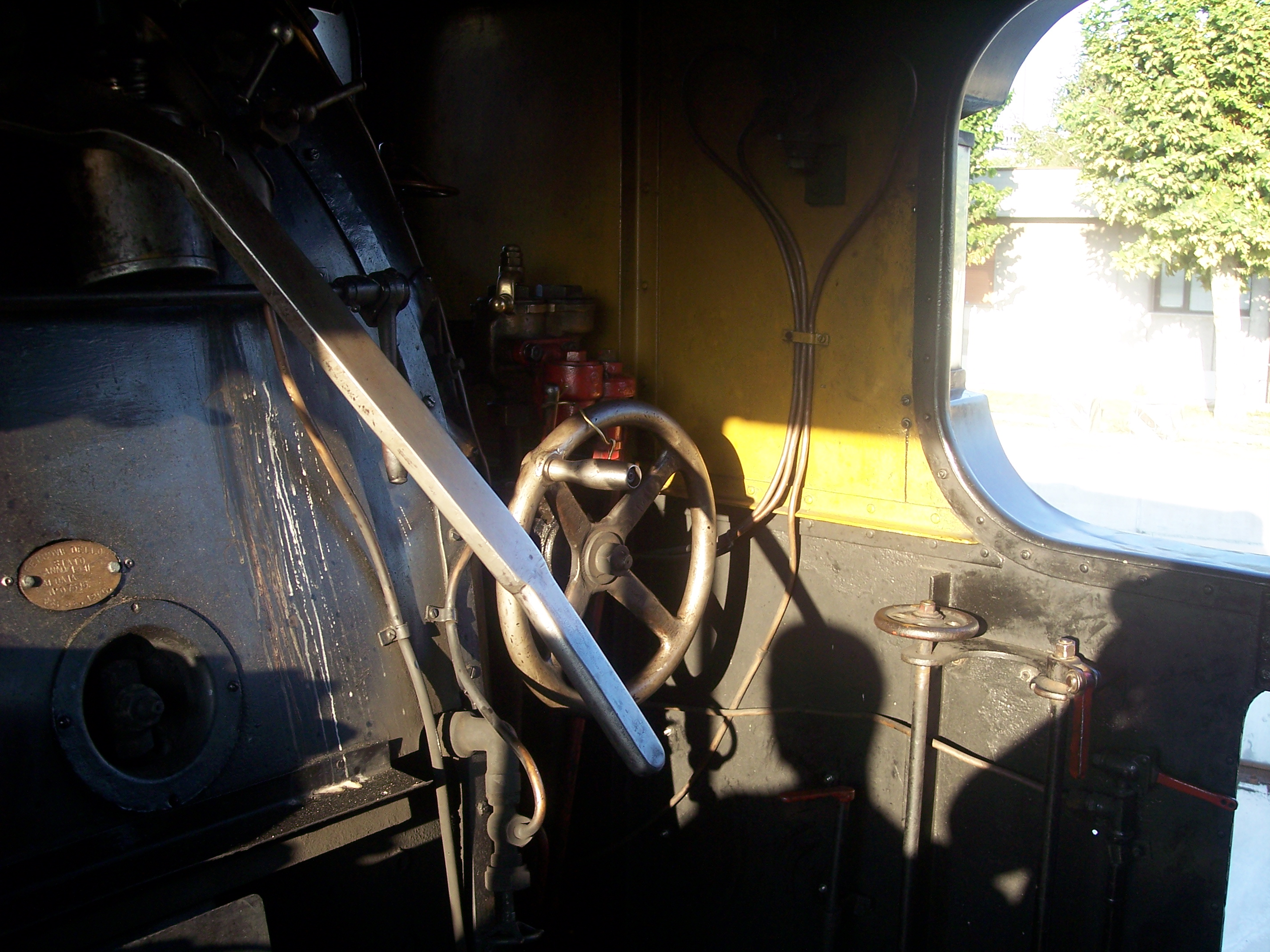 I comandi della locomotiva, la leva del regolatore, il volantino dell'introduzione/inversione di marcia (comando detto comunemente leva), freni. Data l'eta` della locomotiva (740.038, 1906 Breda, Milano) la guida e` ancora a destra. Controls of steam locomotive 740.038, built in 1906 by Breda, Milan. The regulator and wheel were at right, due to the old age of the steamer.